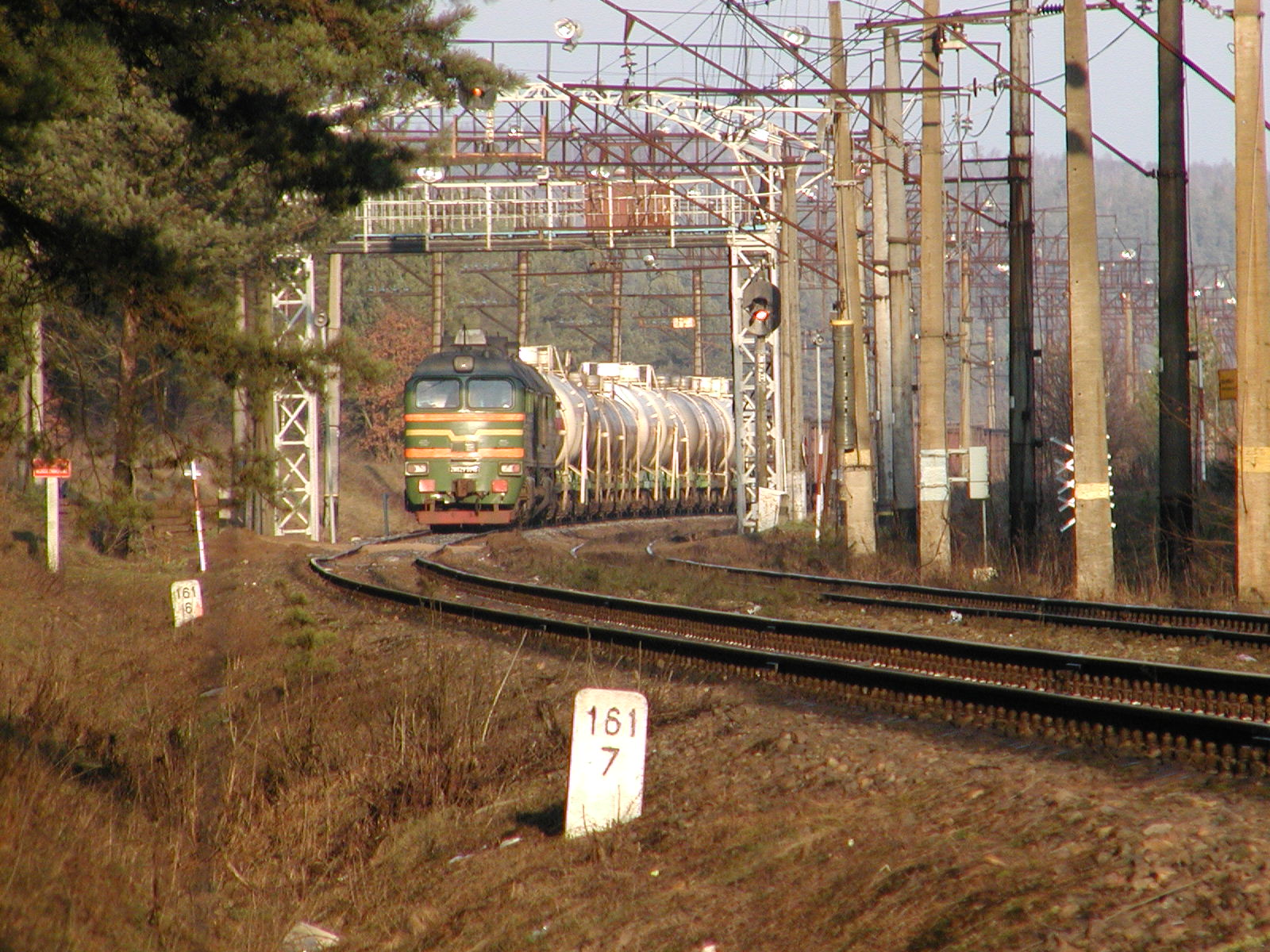 Granica Państwa na linii kolejowej Białystok-Grodno